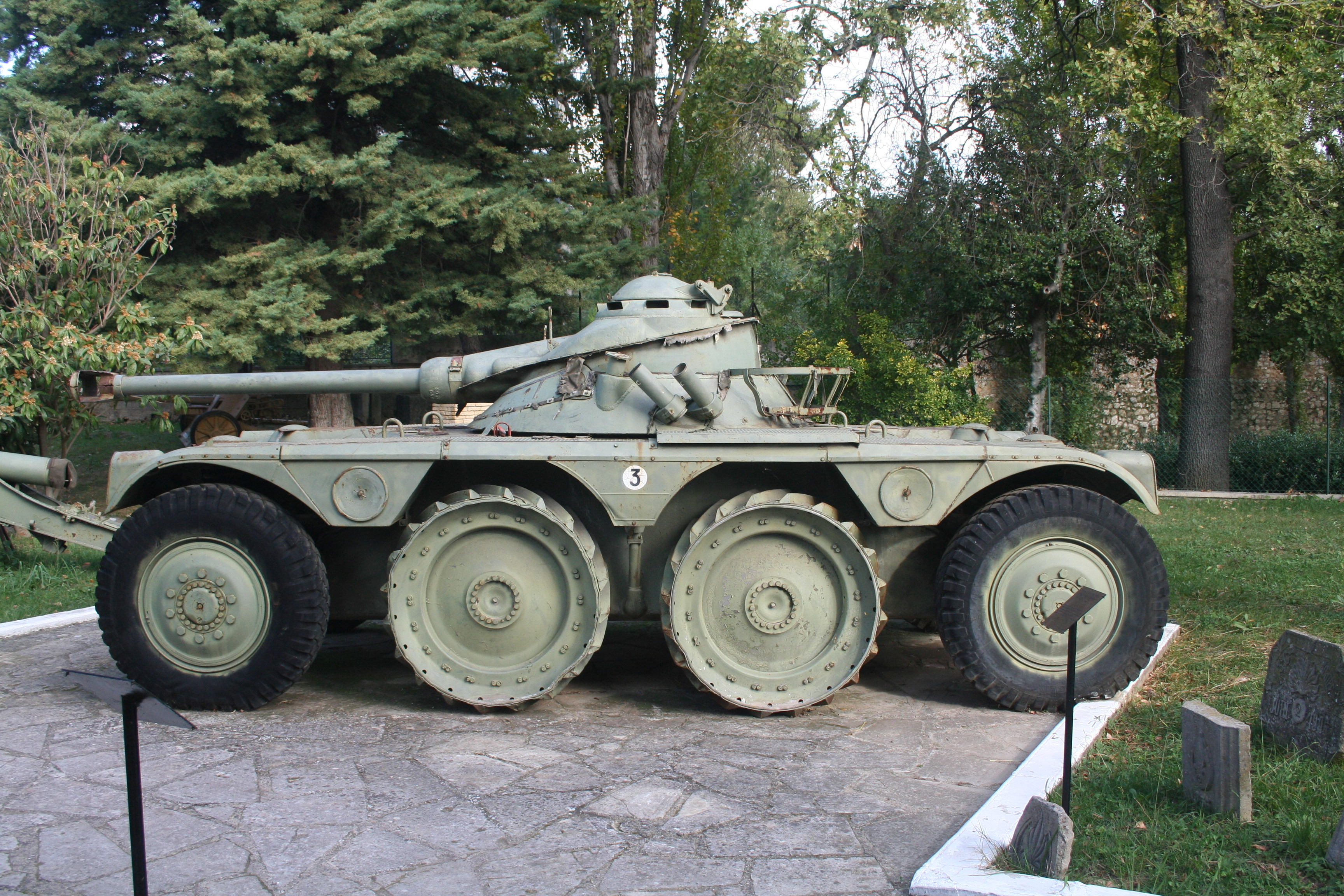 Engin blindé Panhard EBR 75 à roues vu de côté